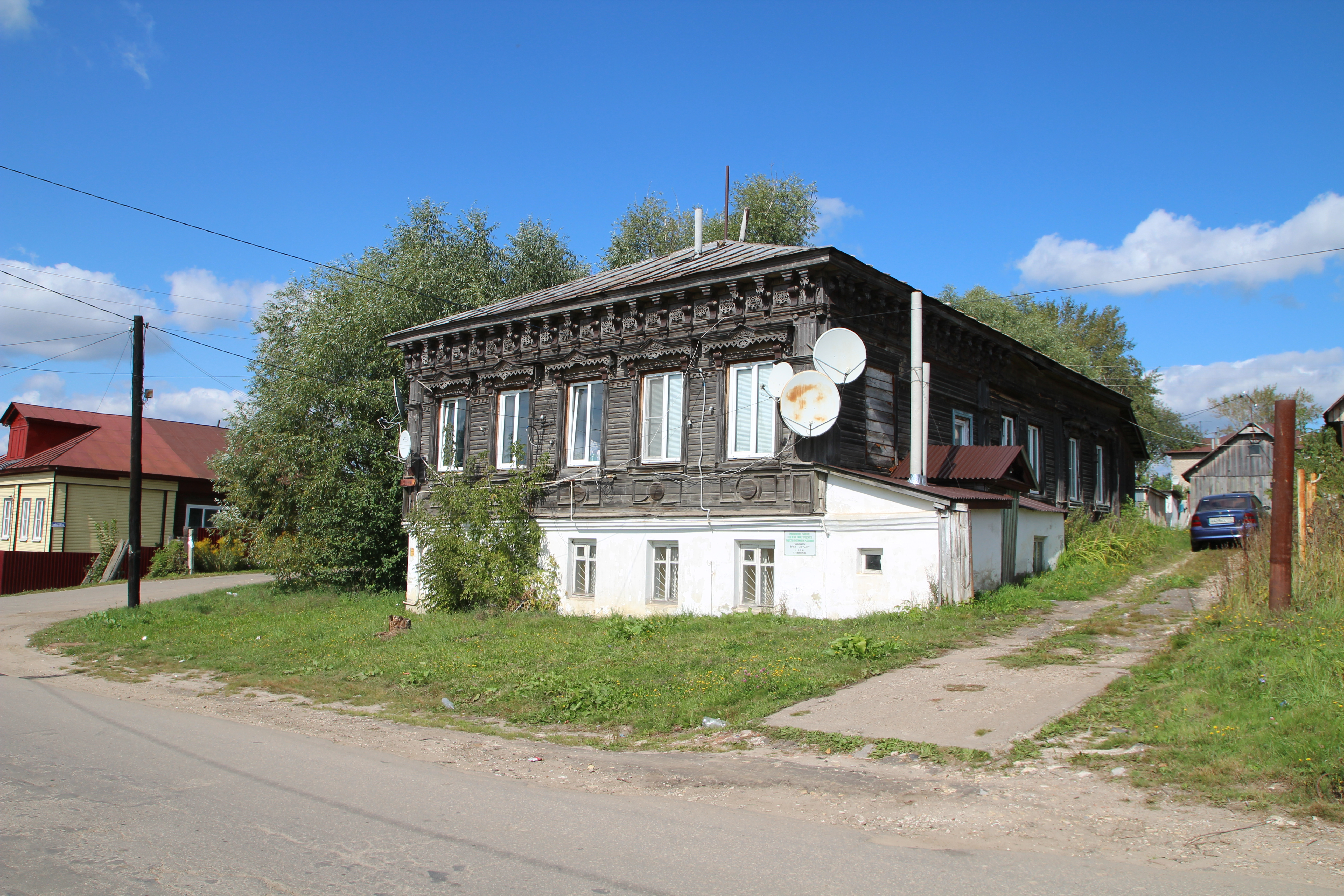 Особняк: улица Коммуны, 34, Лукоянов, Лукояновский район, Нижегородская область